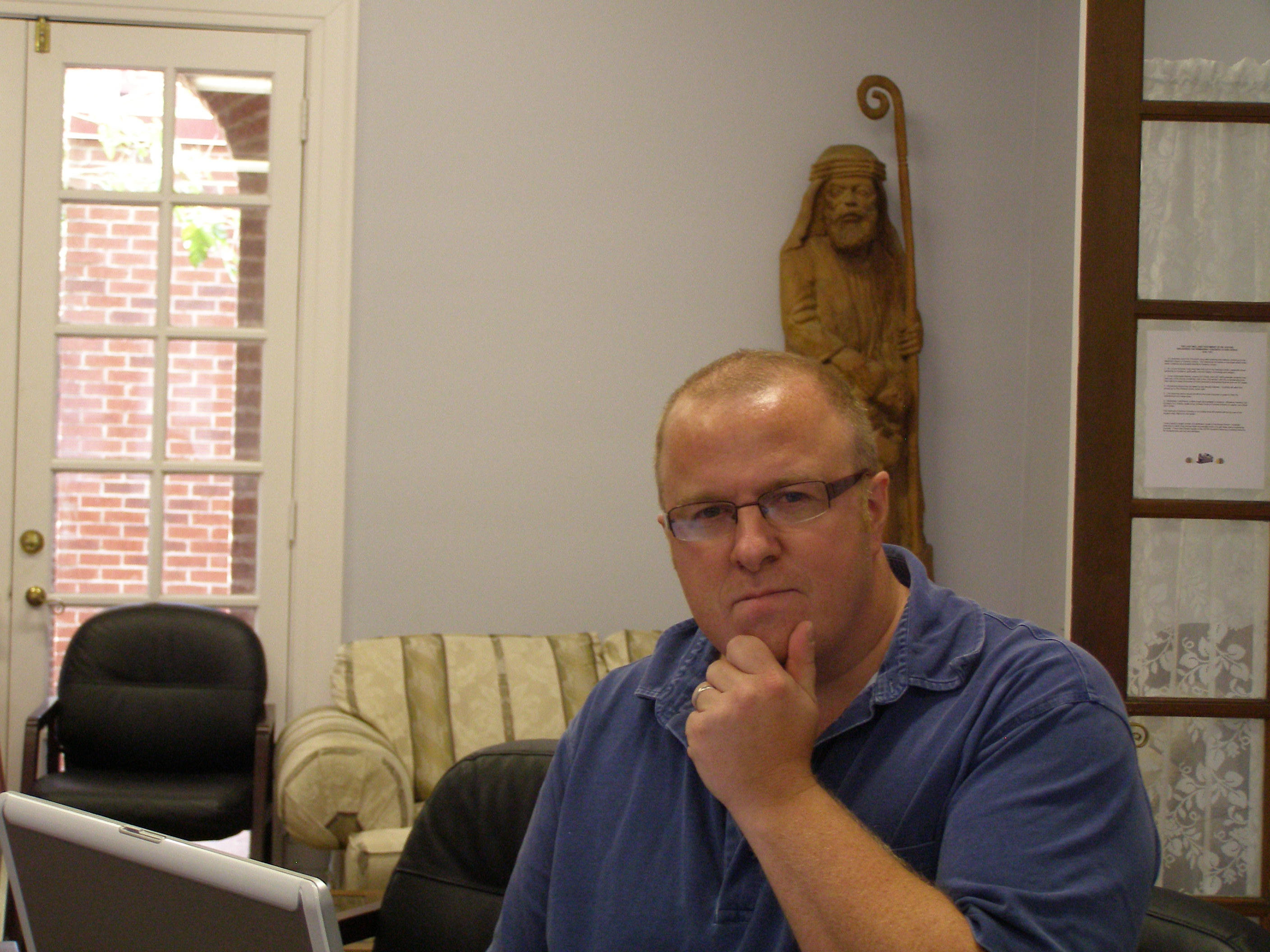 Paul Cobley, Houston TX, St. Thomase Ülikool, Sullivan House